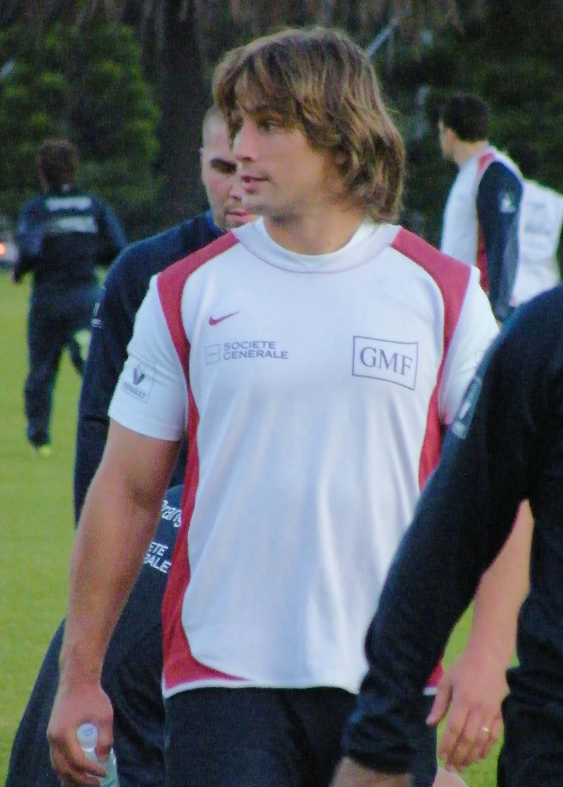 Dimitri Szarzewski - French Rugby Union Training - Moore Park, Sydney 23 June 2009.